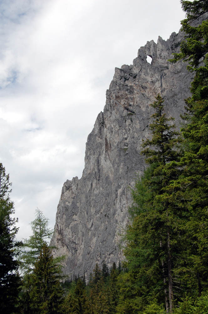 Meßnerin Westgrat mit Felsenfenster, Hochschwab, Steiermark